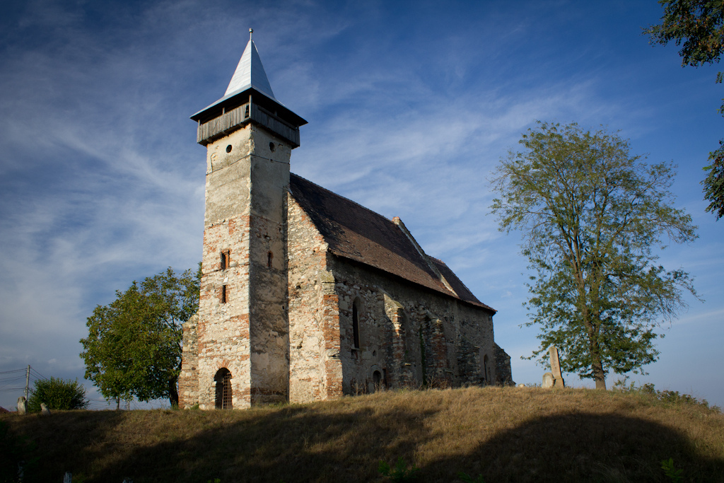 Reformed church in Sântimbru/Marosszentimre, Romania